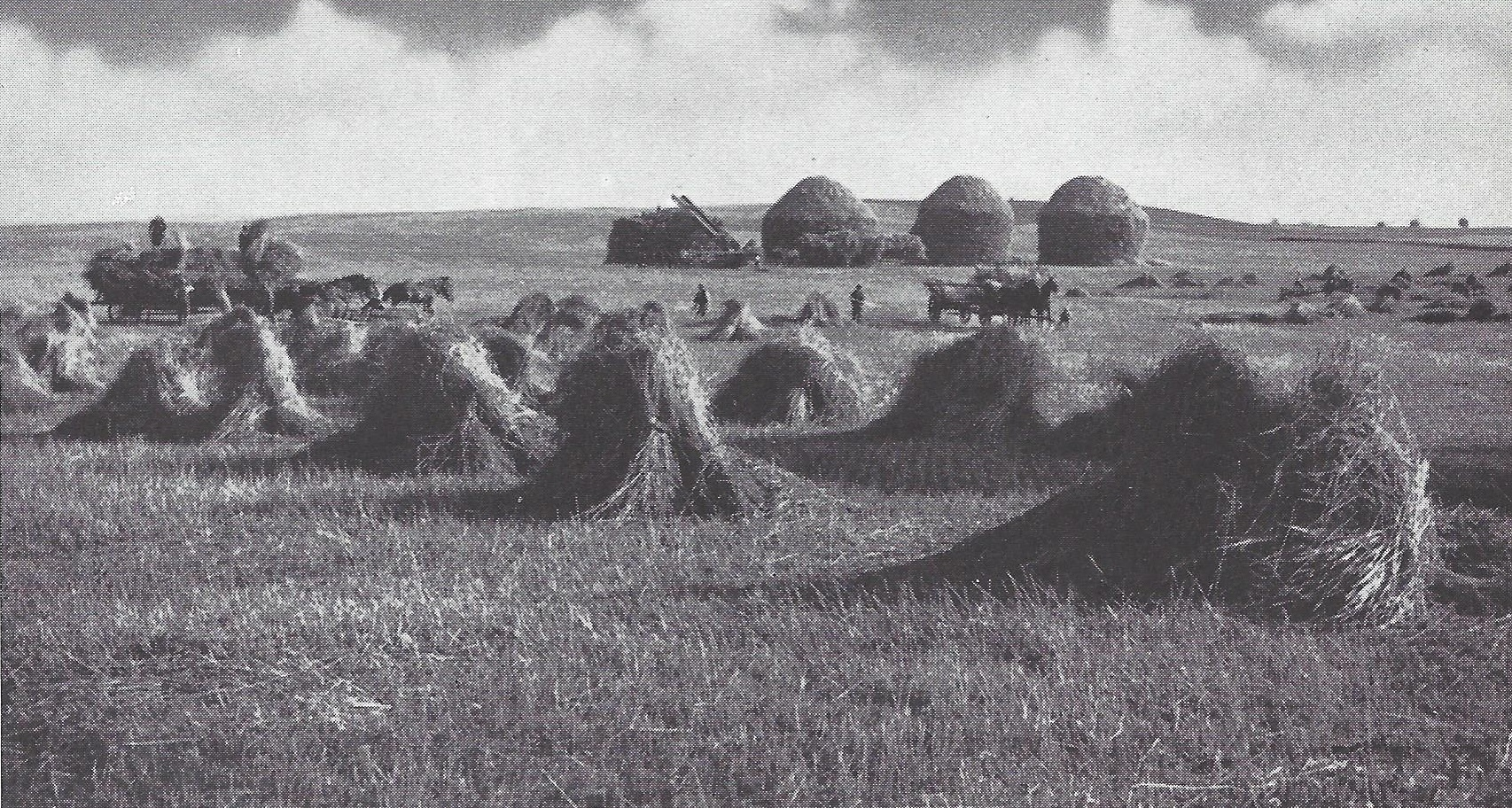 Kornhocken auf dem Schlachtfeld von Tannenberg.